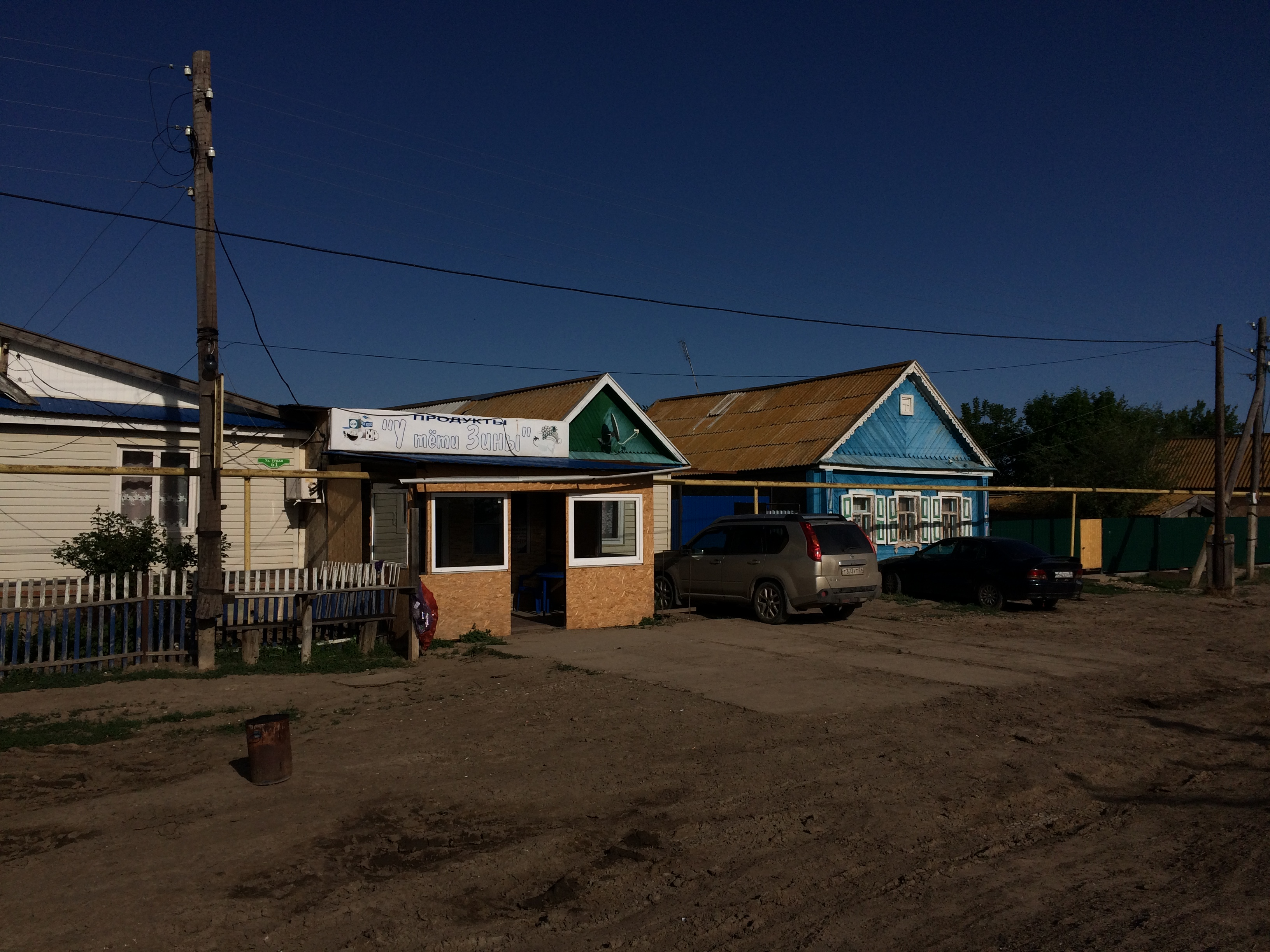 Продуктовый магазин и жилой дом на главной улице села Ново-Булгары.